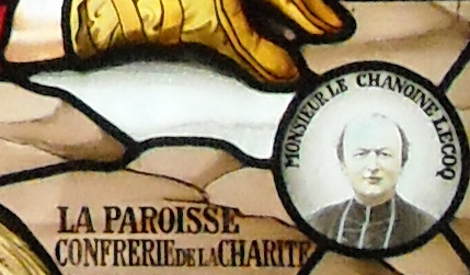 Portrait de Monsieur le Chanoine Lecoq, prêtre de Saint Victor.